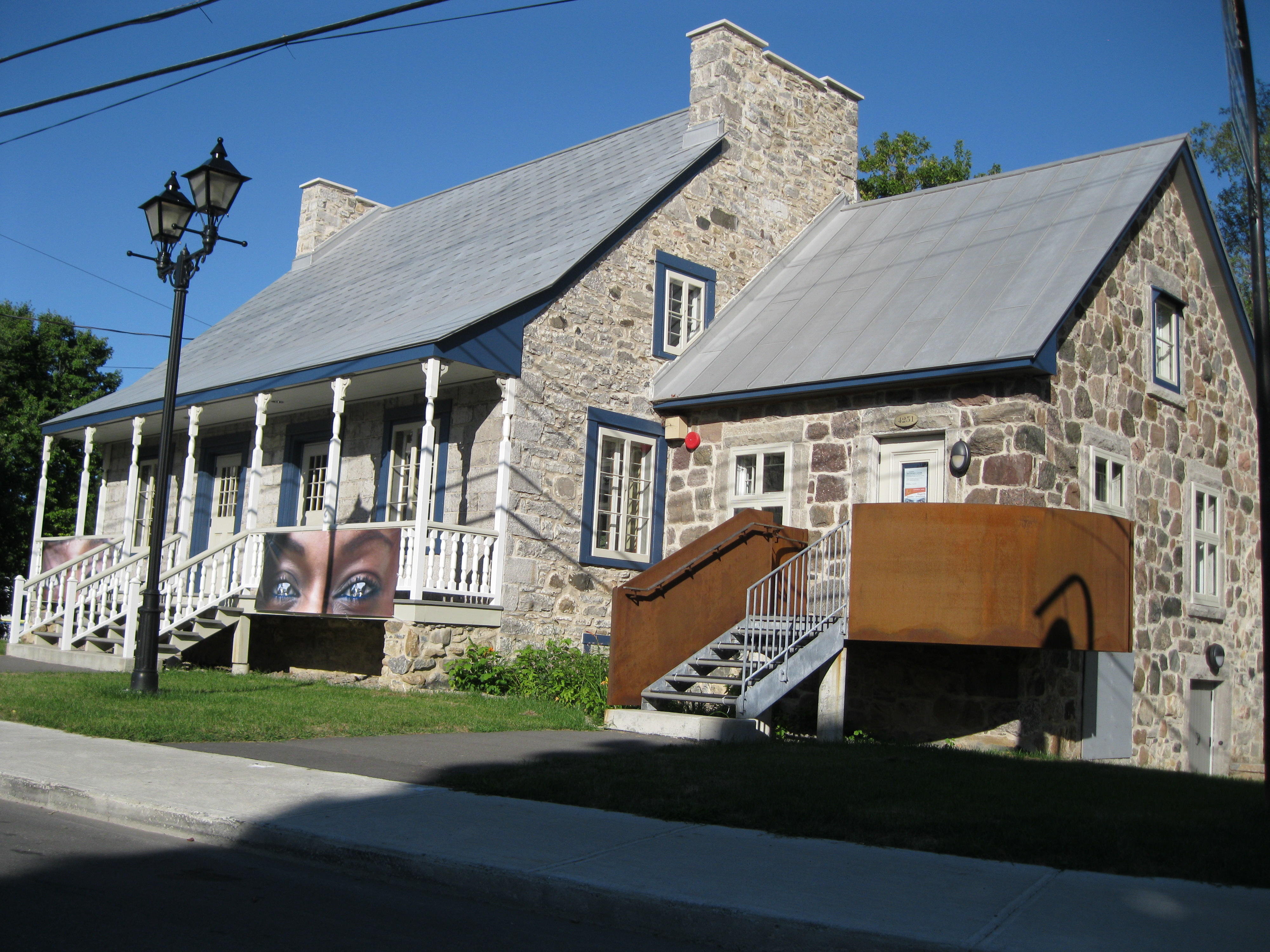 La maison Brignon-Dit-Lapierre, citée monument historique, est une maison de ferme construite vers 1770. Elle est située au 4251, Boulevard Gouin Est, Montréal, dans l'arrondissement de Montréal-Nord